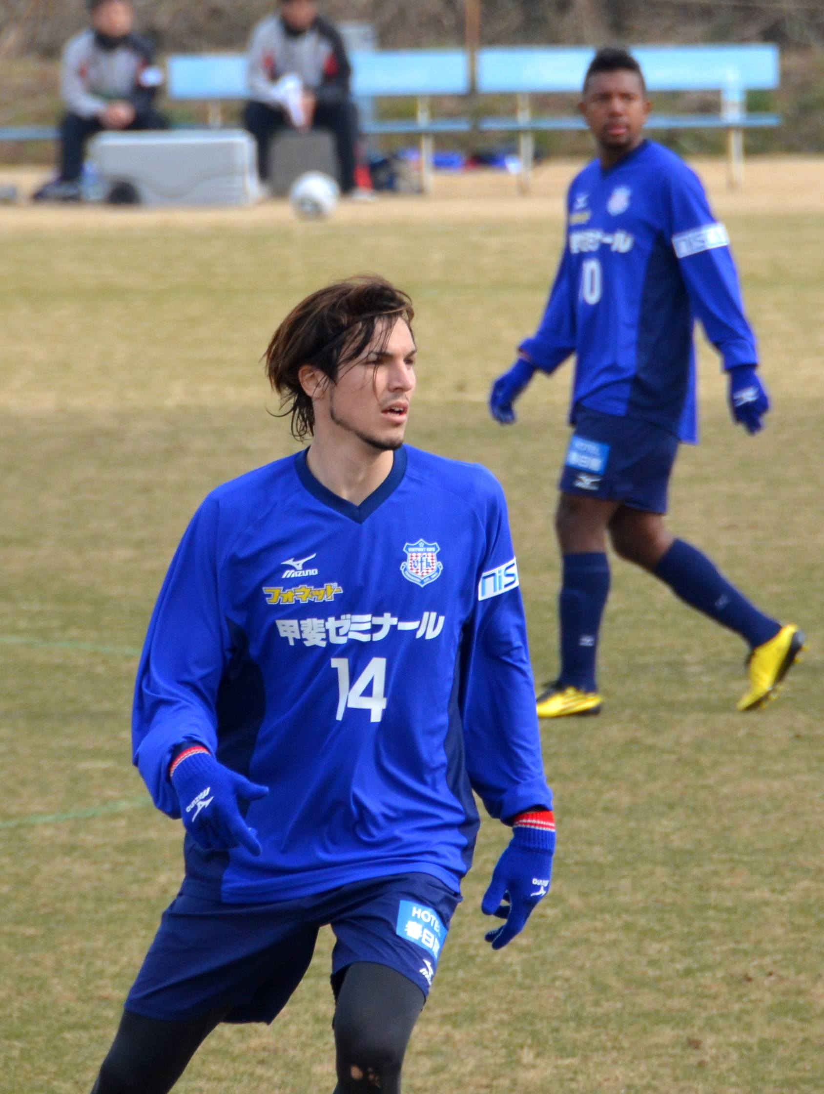 Mike HAVENAAR